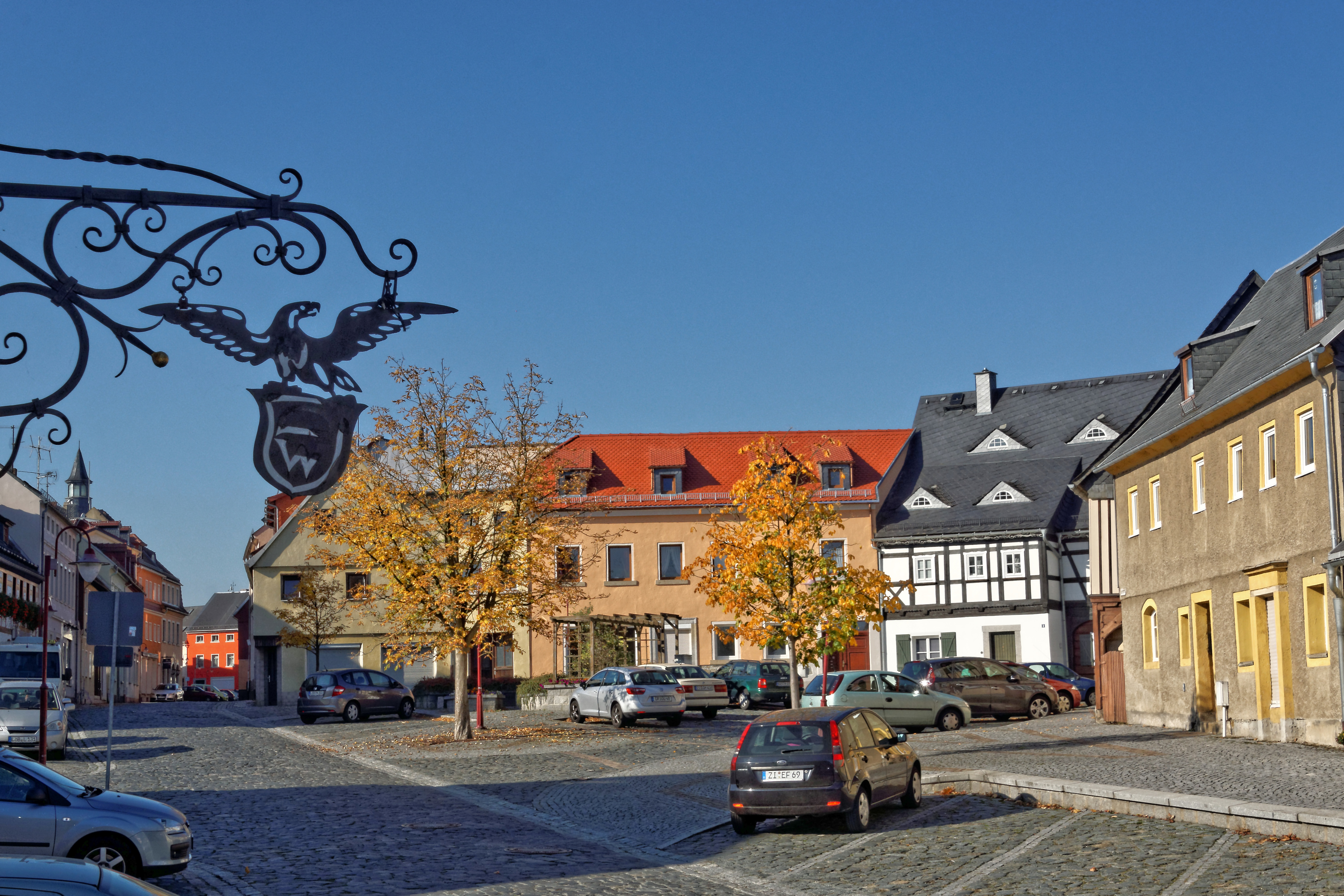 Der Niedermarkt, links die Friedrich-von-Salza-Straße